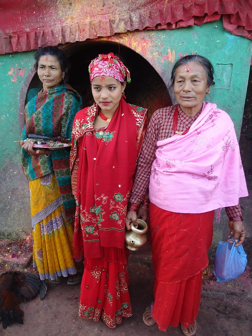 नेपाली: nepali hindu saskar